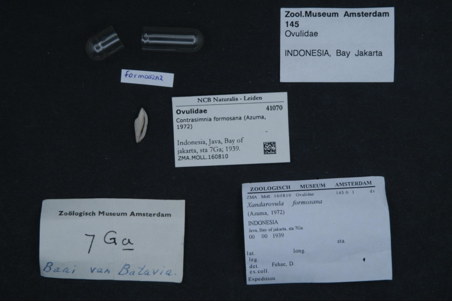 Contrasimnia formosana (Azuma, 1972)